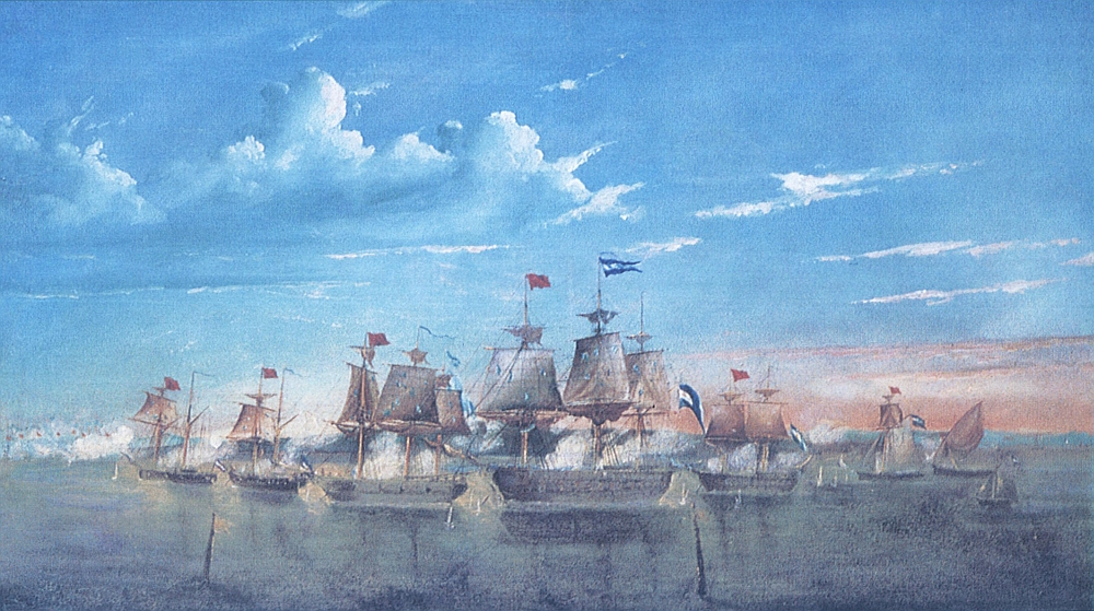 Combate de Martin Garcia (1814)